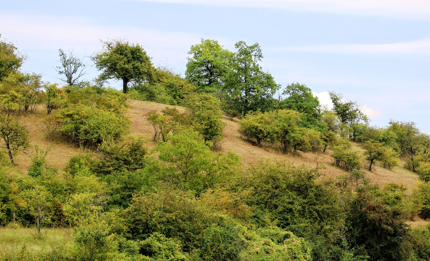 Blick auf das Naturschutzgebiet (Aufn. September 2017)